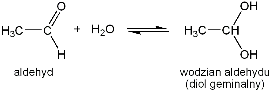 Równowaga aldehyd - wodzian aldehydu